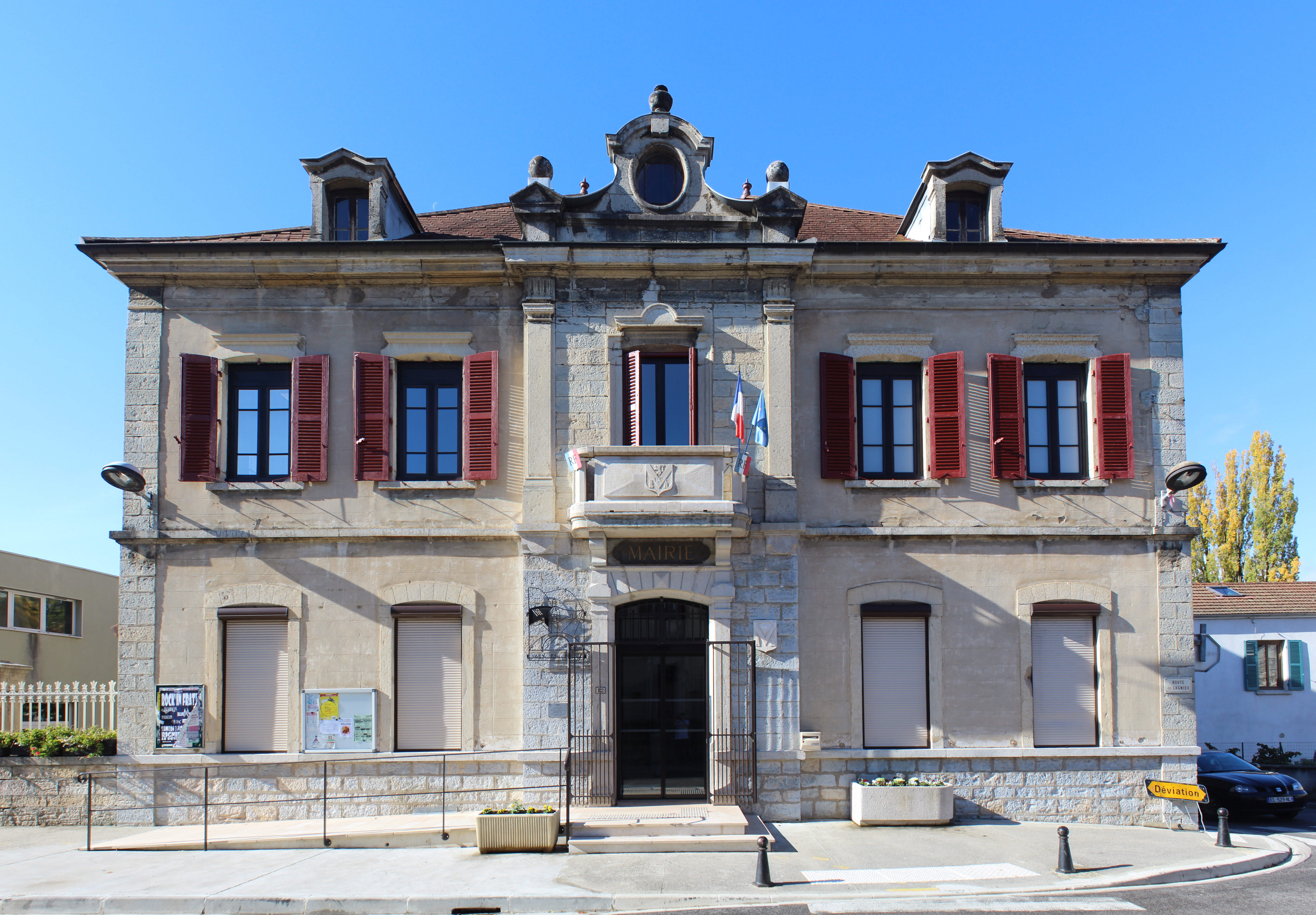 Mairie de Vaux-en-Bugey.